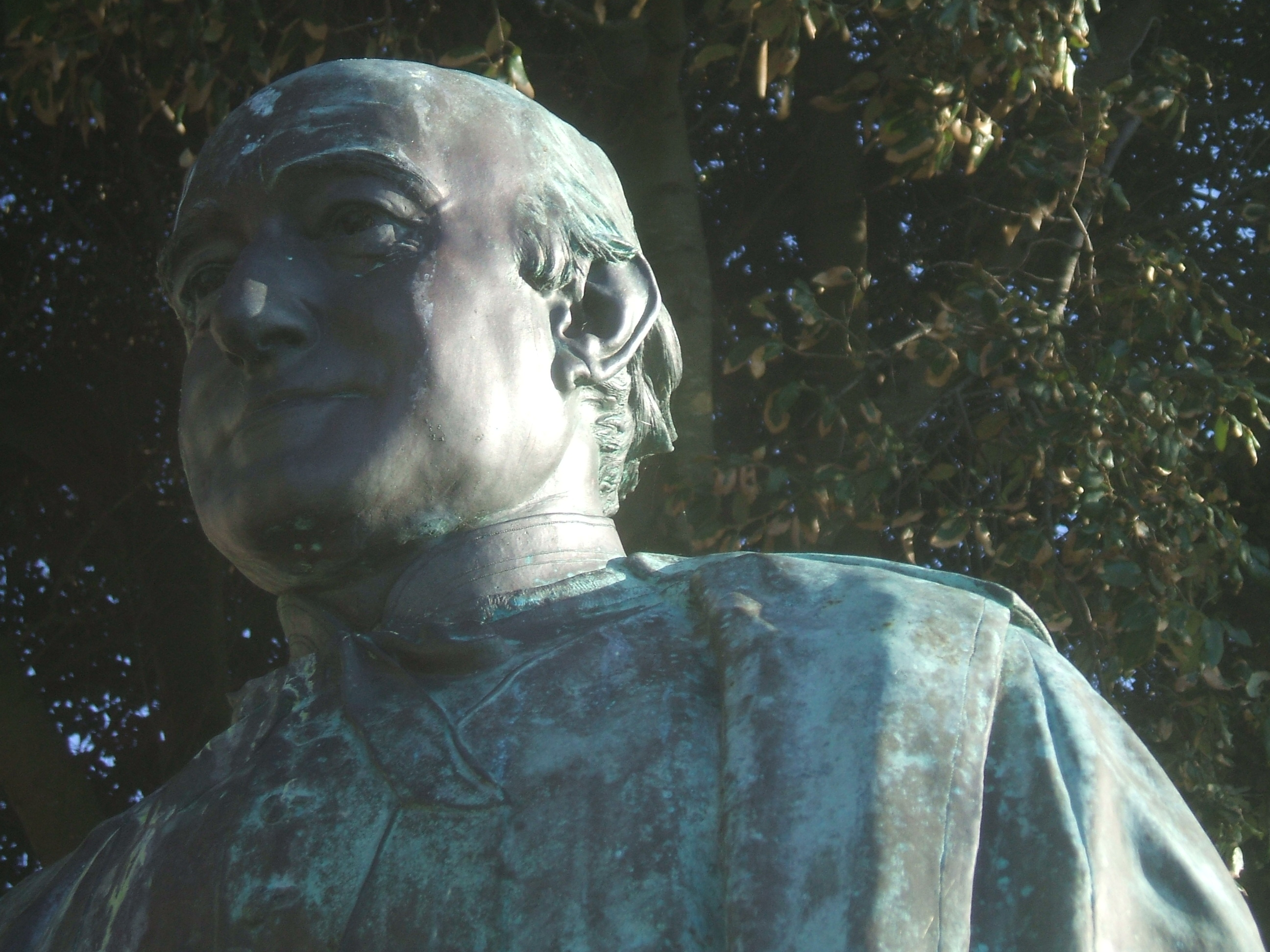 Gros plan sur le buste en bronze de l'historien et académicien Louis Duchesne (1843-1922) par Paul Roussel au jardin des Bas-Sablons à Saint-Malo, quartier de Saint-Servan (place Monseigneur Duchesne).